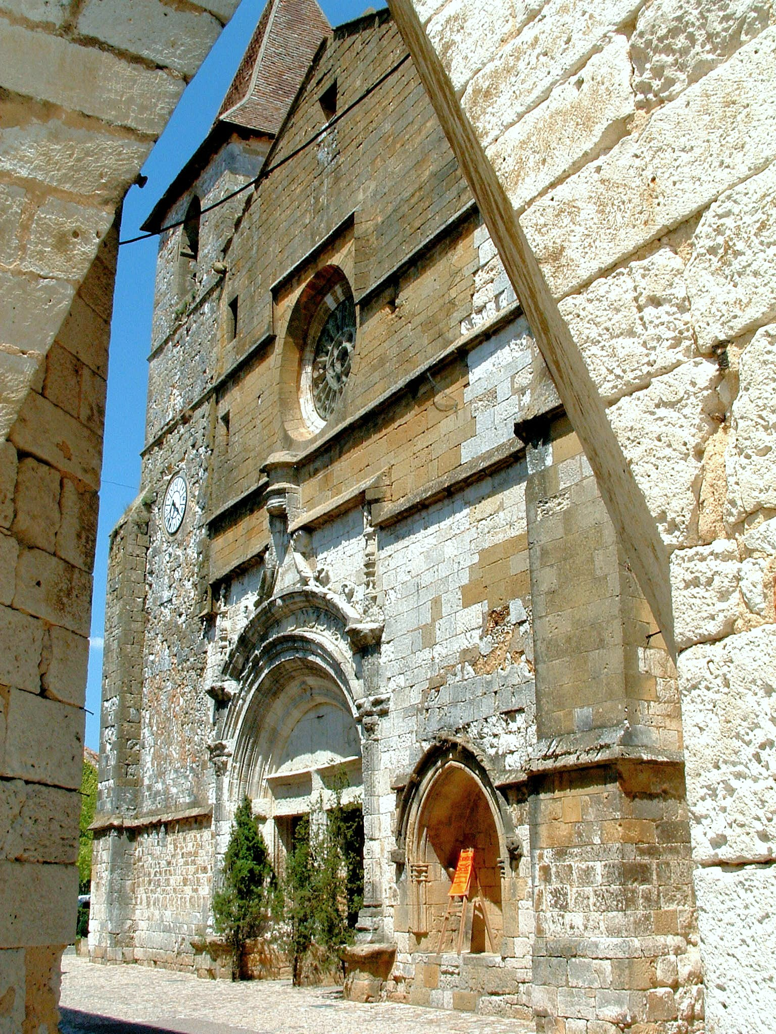 Monpazier - Église Saint-Dominique vue d'une cornière de la place